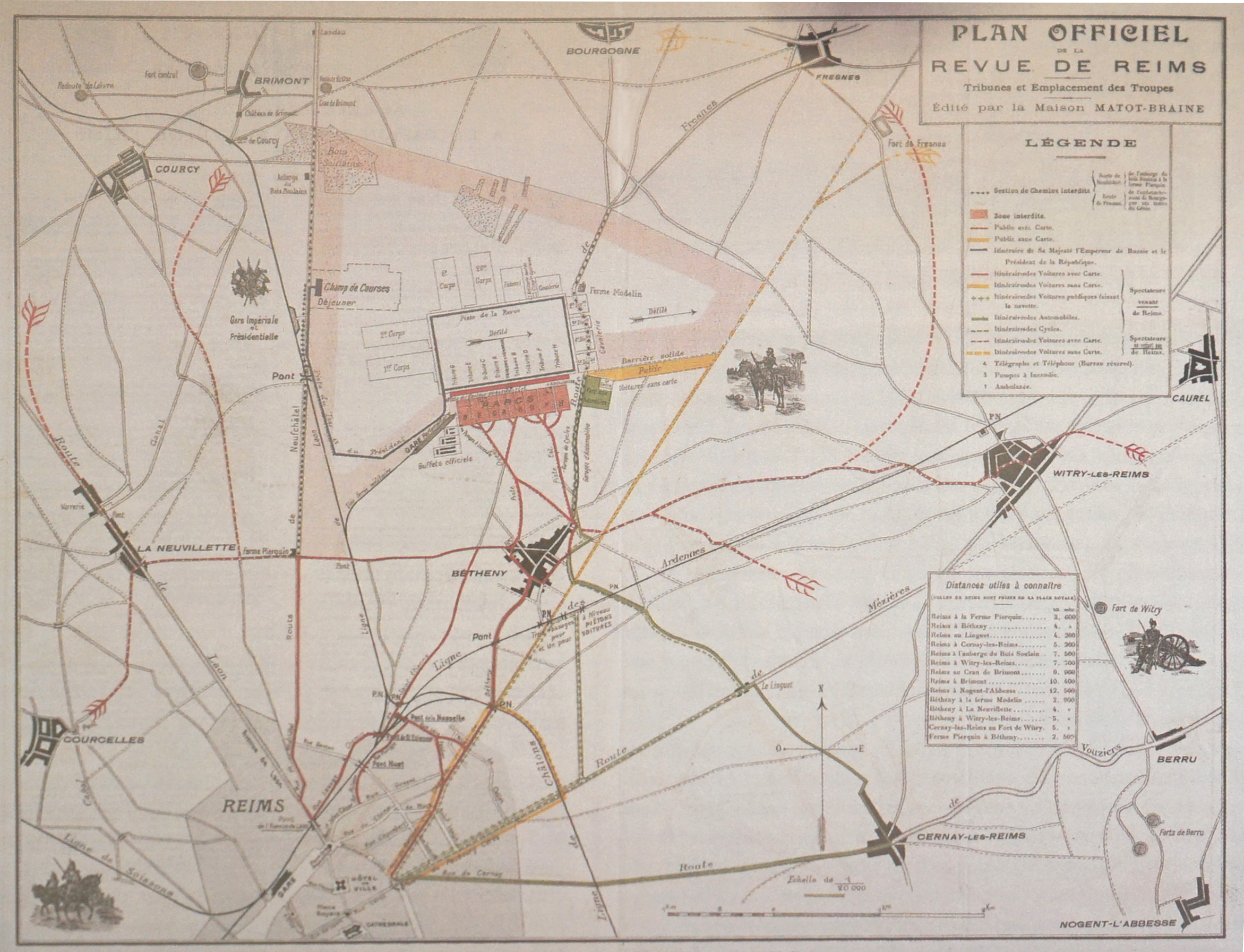 Plan_de_la_grande revue_à_Bétheny, 21 septembre 1901.